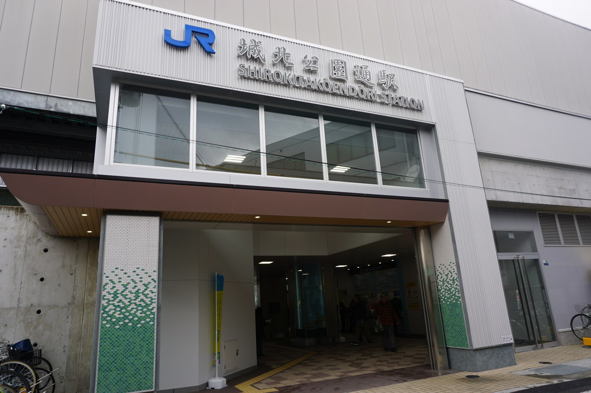 2019年3月撮影 Sony ILCE-6000